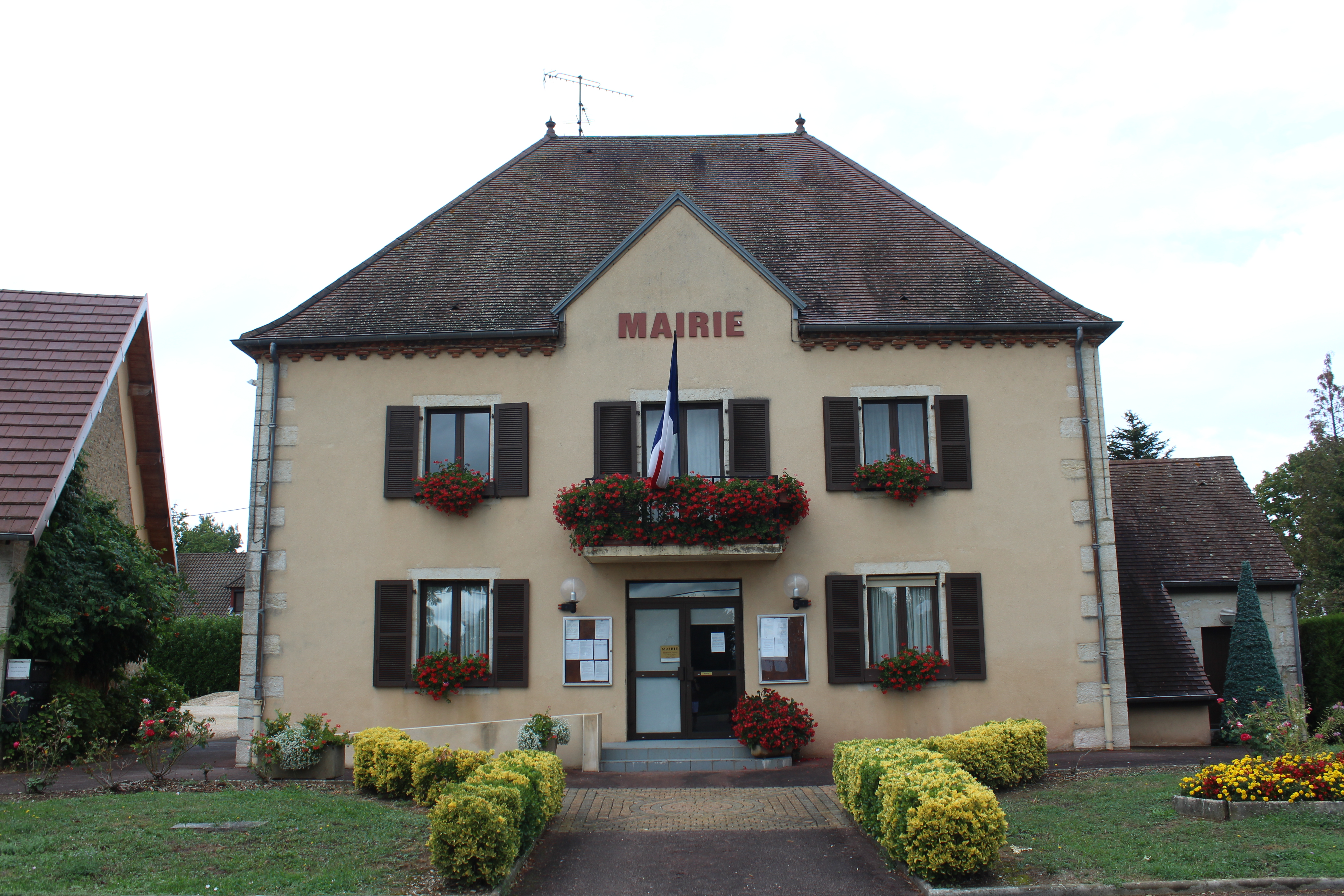 Mairie du Deschaux.